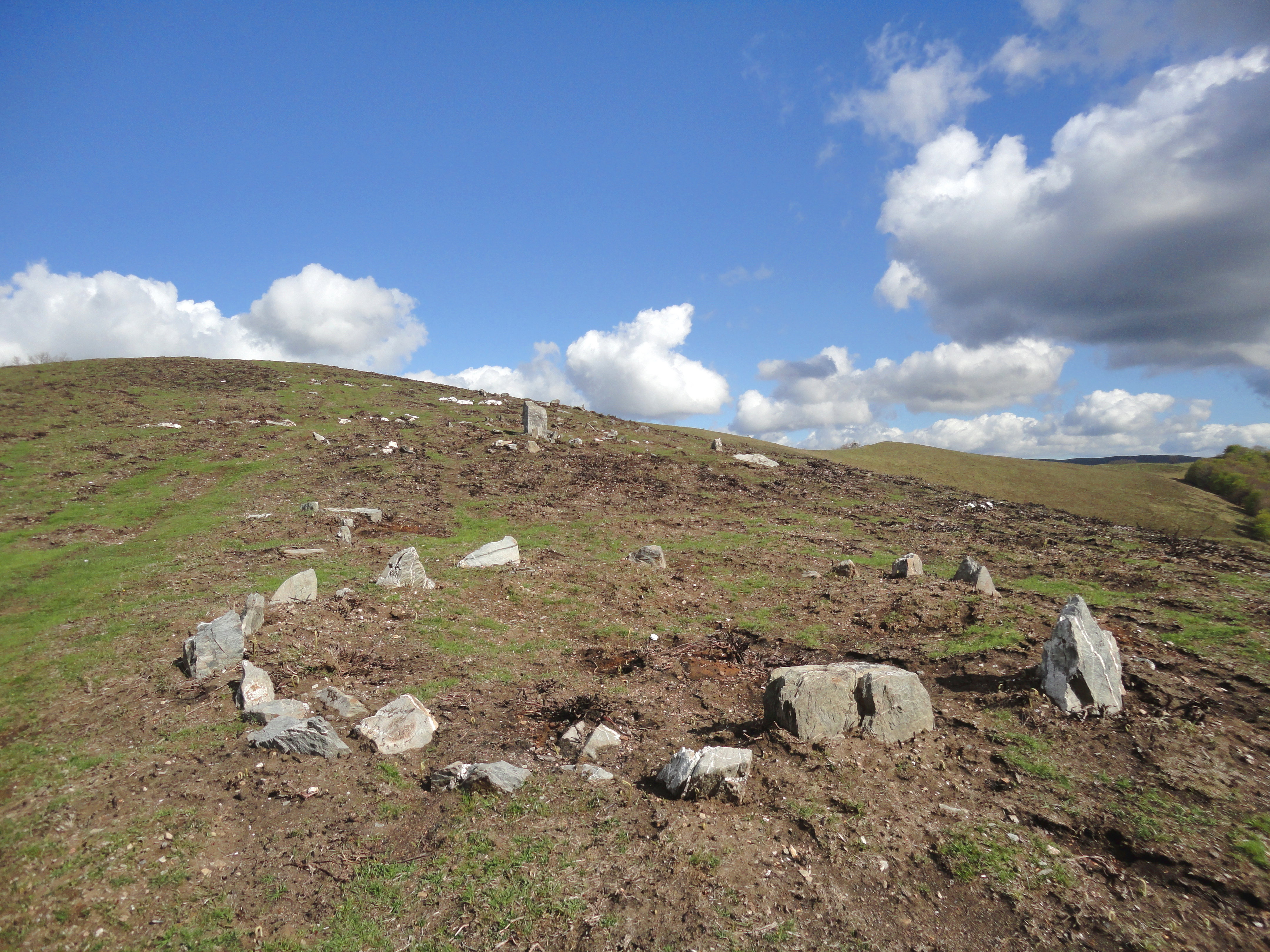 Izurriztiko bizkarra harrespilak